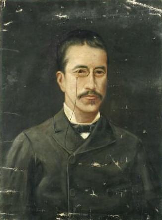 土佐宿毛領12代領主・伊賀陽太郎氏成の肖像画。